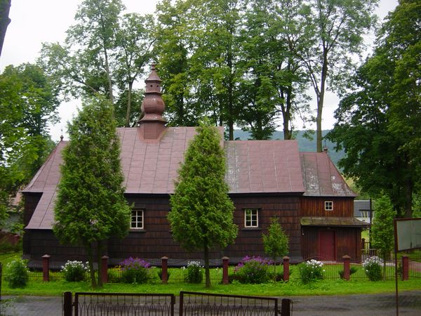 Lodyna - cerkiew. Autor: wikipedysta:Frankee, 2005